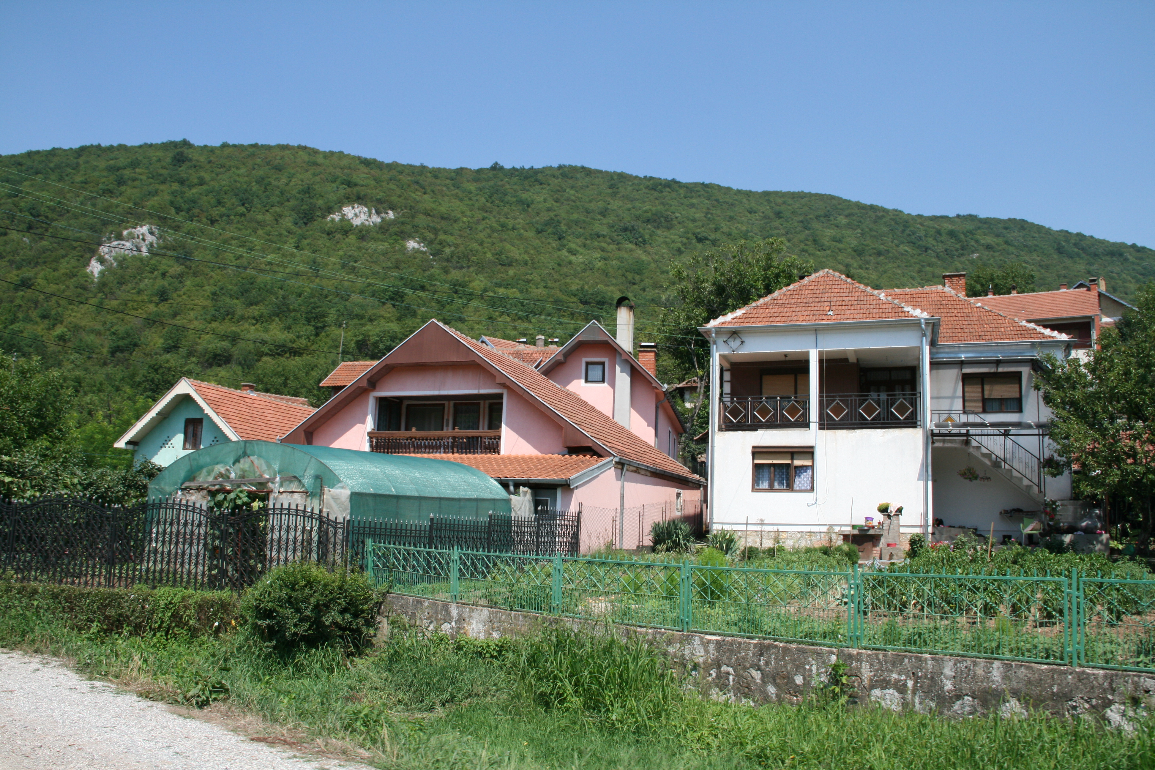 Јуће у селу Јеловац